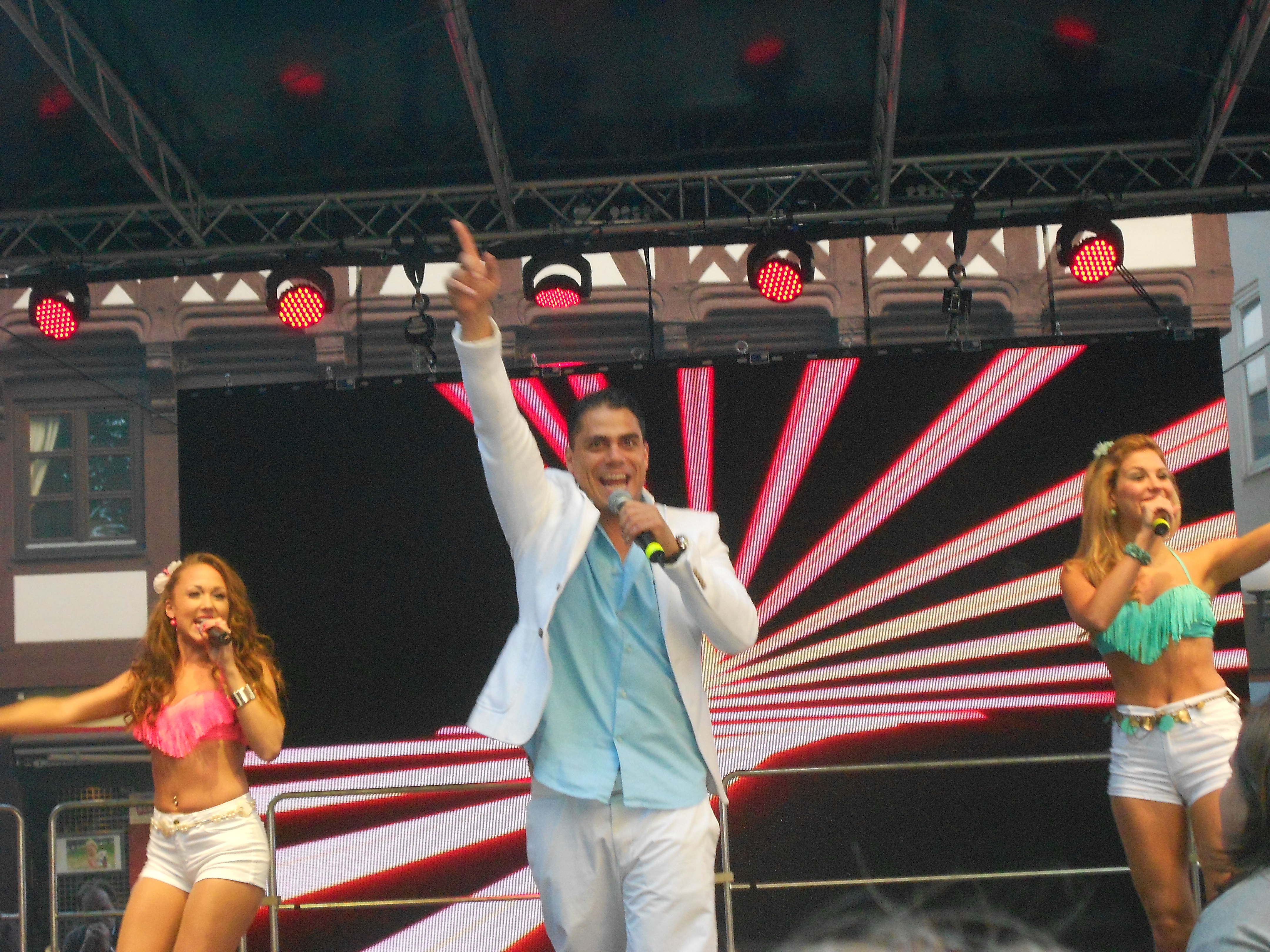 Hot Banditoz beim Gänseliesel-Fest in Göttingen